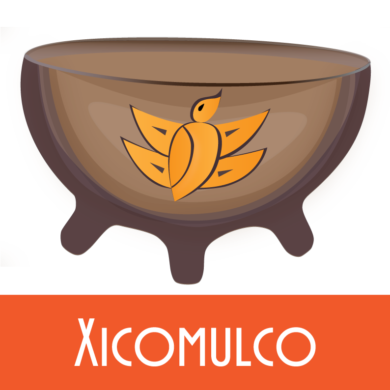 Glifo editado del pueblo de Xicomulco